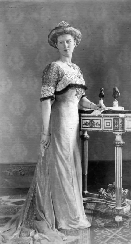 Viktoria Adelheid von Sachsen-Coburg und Gotha Herzogin Viktoria Adelheid von Sachsen-Koburg und Gotha geb. Prinzessin zu Schleswig-Holstein-Sonderburg-Glücksburg. ADN-ZB/Archiv: Viktoria Adelheid Herzogin von Sachsen-Coburg und Gotha, geb. Prinzessin zu Schleswig-Holstein-Sonderburg-Glücksburg, geb. 31. 12. 1885 Aufn.: um 1912 F. Langhammer, Detmold [Porträt Viktoria Adelheid von Sachsen-Coburg und Gotha] Abgebildete Personen: Sachsen-Coburg und Gotha, Karl-Eduard von: 1884-1954, Herzog, Präsident des Deutschen Roten Kreuzes, Deutschland